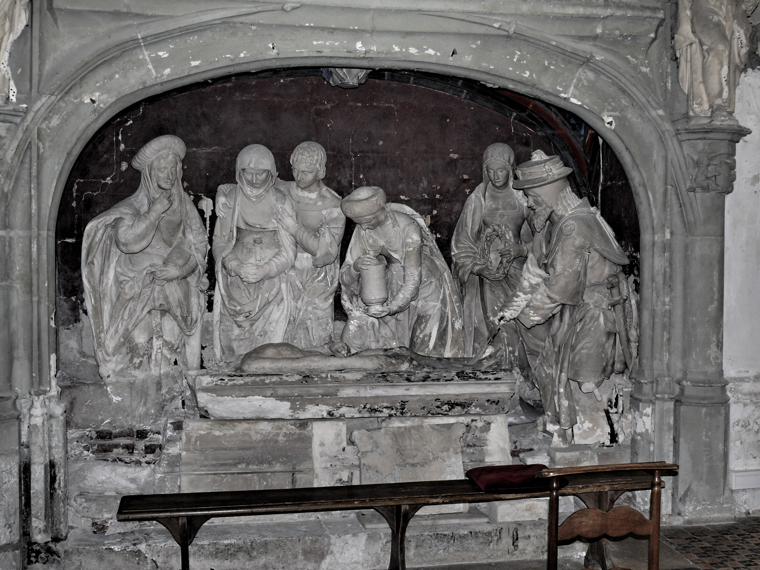 Marseille-en-Beauvaisis (Oise - Picardie - France) : Chapelle des Saintes Hosties - La mise au tombeau